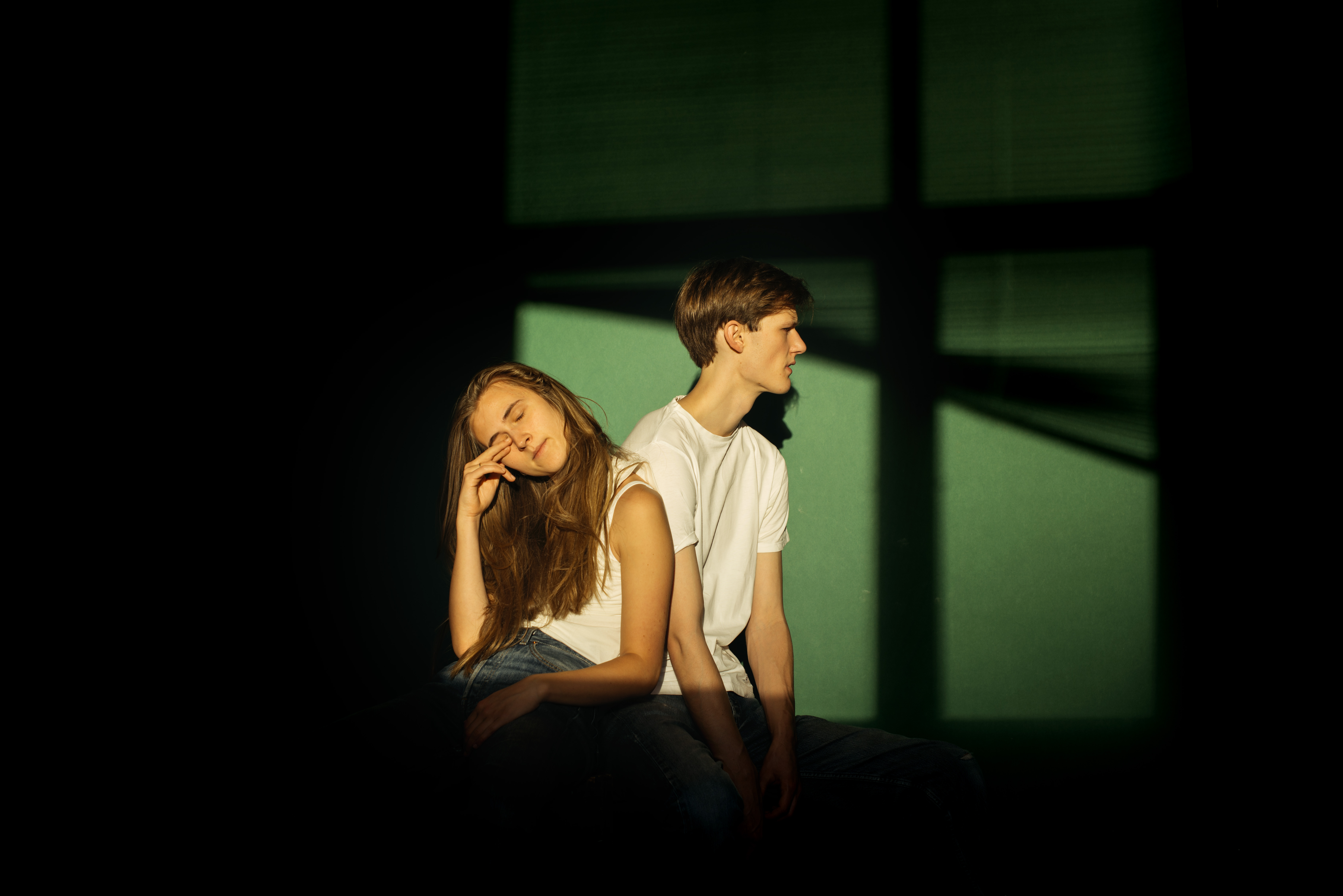 Pressebilde av Konradsen, 2019